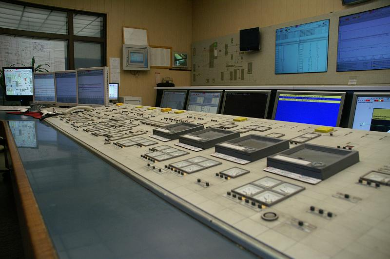 Schaltwarte Block 6 des Kraftwerks im Hafen